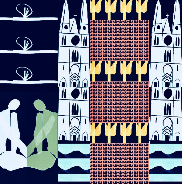 Keramik Motiv / 2018.